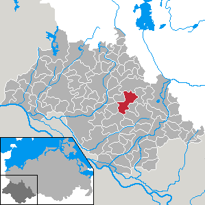 Picher in Mecklenburg-Vorpommern - district Ludwigslust